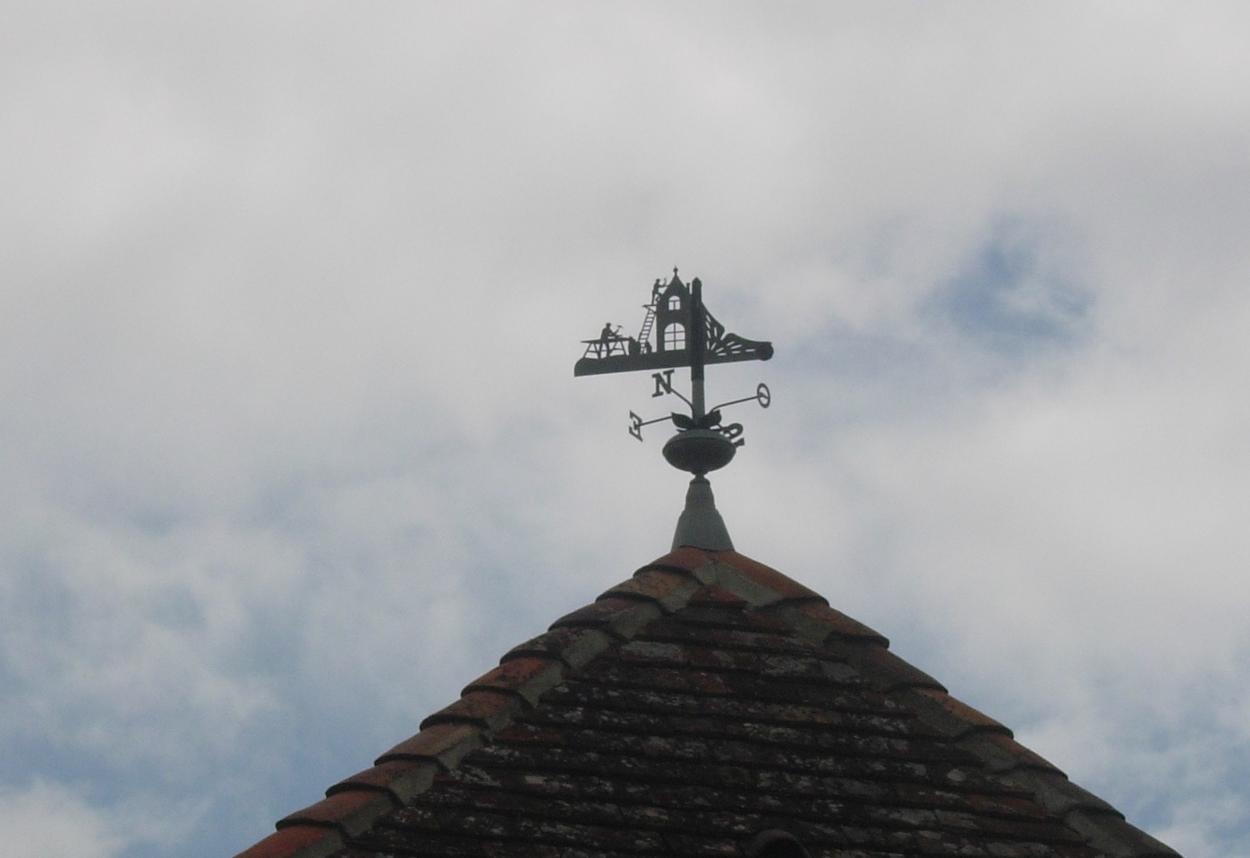 Girouette de Montaulin